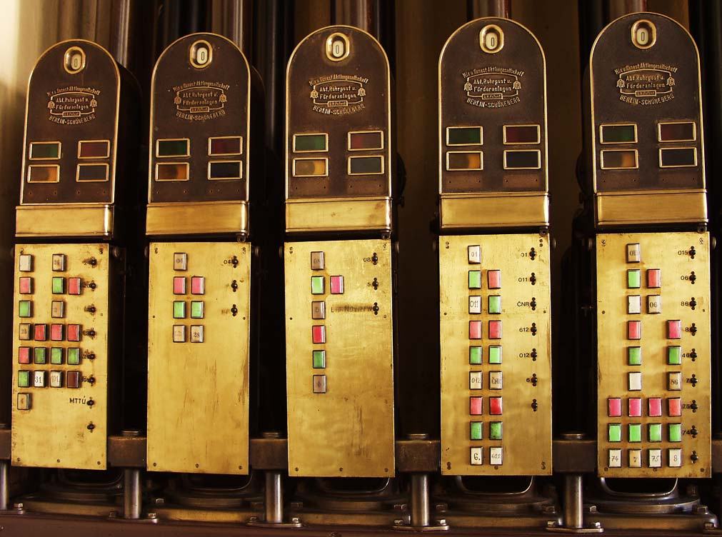 Hlavy pěti hlavních tras pražské potrubní pošty Hornjoserbsce: Wobraz pokazuje hłownu wobsłužbnu taflu Praskeho rołoweho pósta